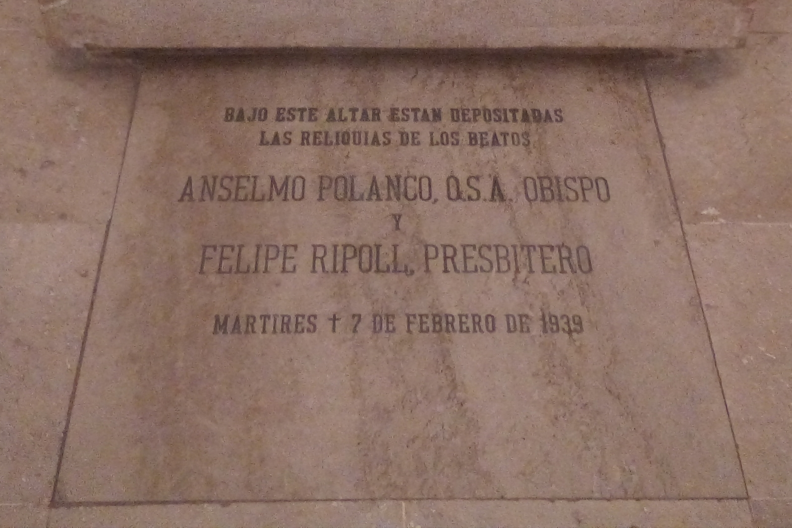 Placa en honor a Anselmo Polanco y Felipe Ripoll, asesinados por el bando republicano durante la Guerra Civil Española.